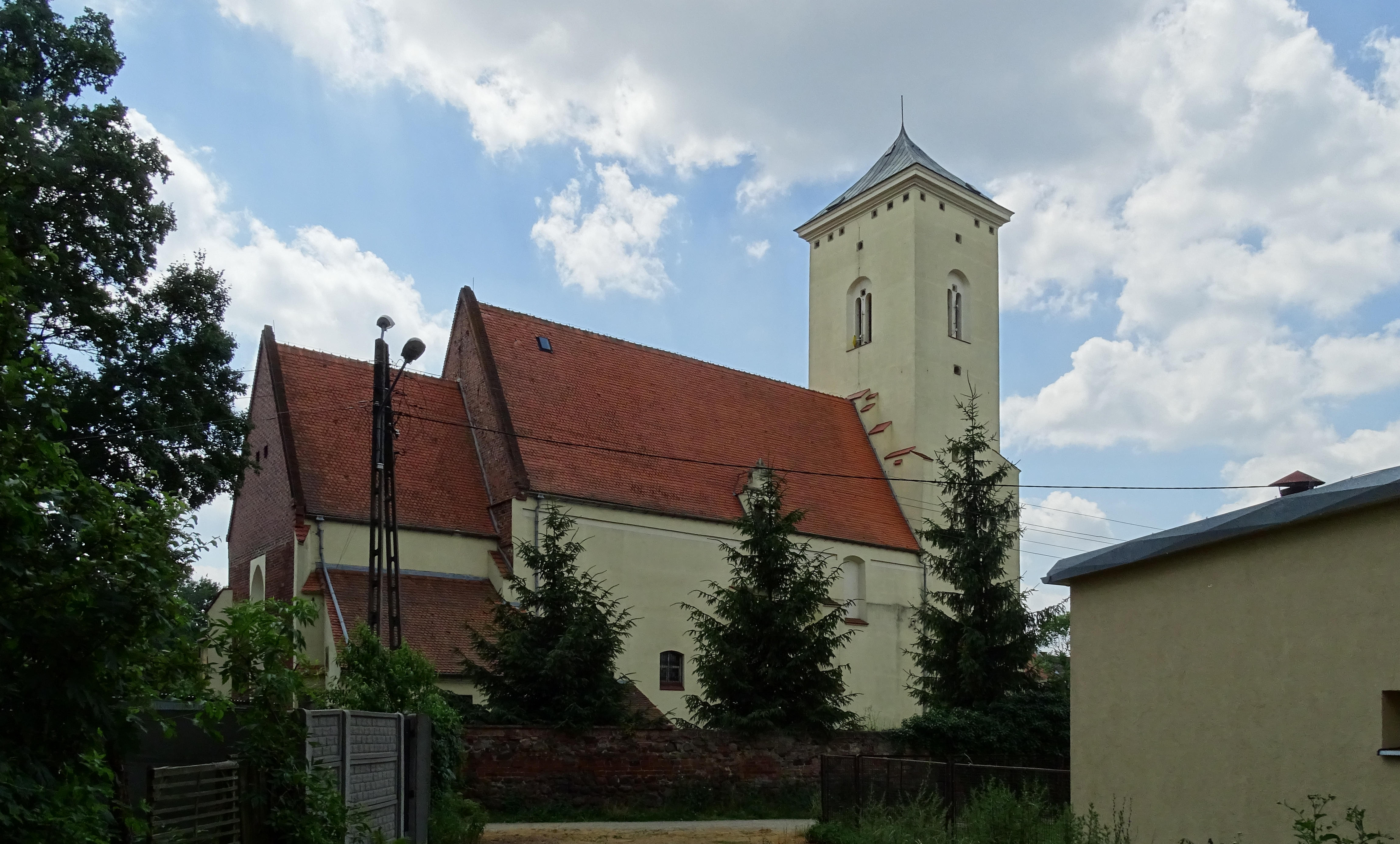 Czernina, kościół par. p.w. św. Wawrzyńca, ok. 1400, 1545-1595